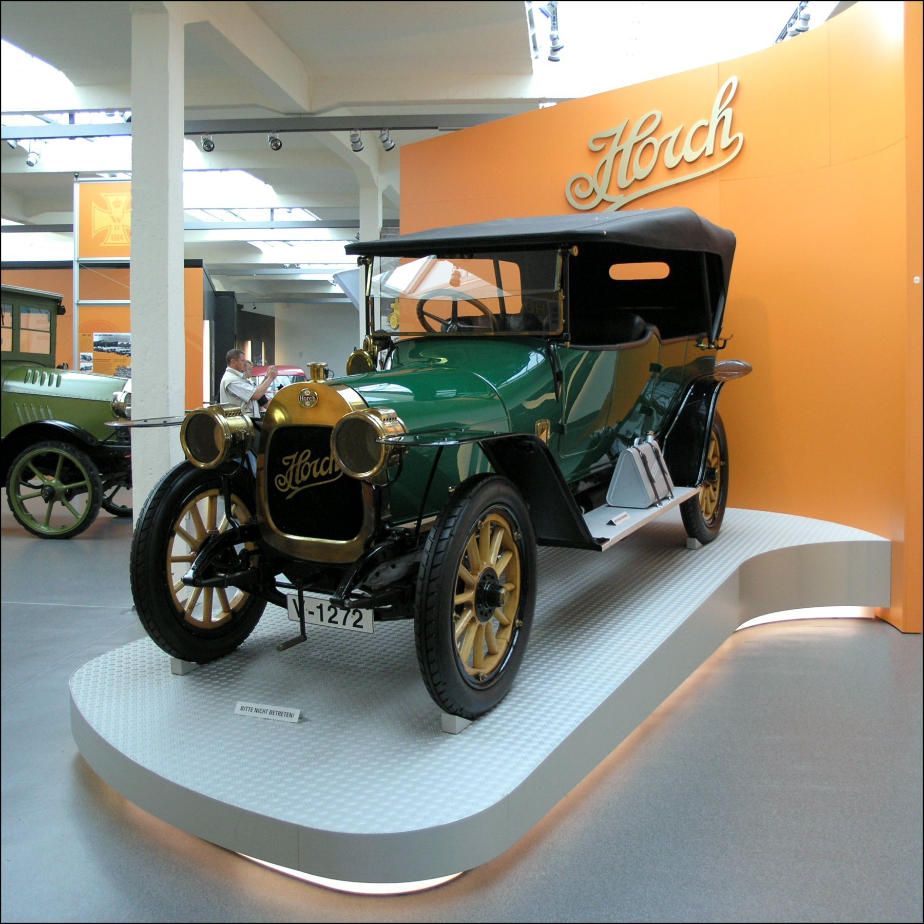 Horch 12/28 PS (1911 / 1910-1911 90 vozů